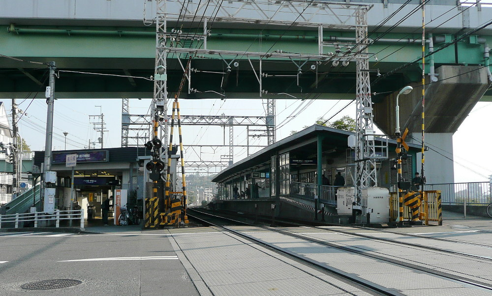 京阪宇治線観月橋駅 向かって左手の乗り場が宇治方面、右手の乗り場が中書島方面 手前を横切る道路は国道24号で観月橋のたもとにあるため若干傾斜している